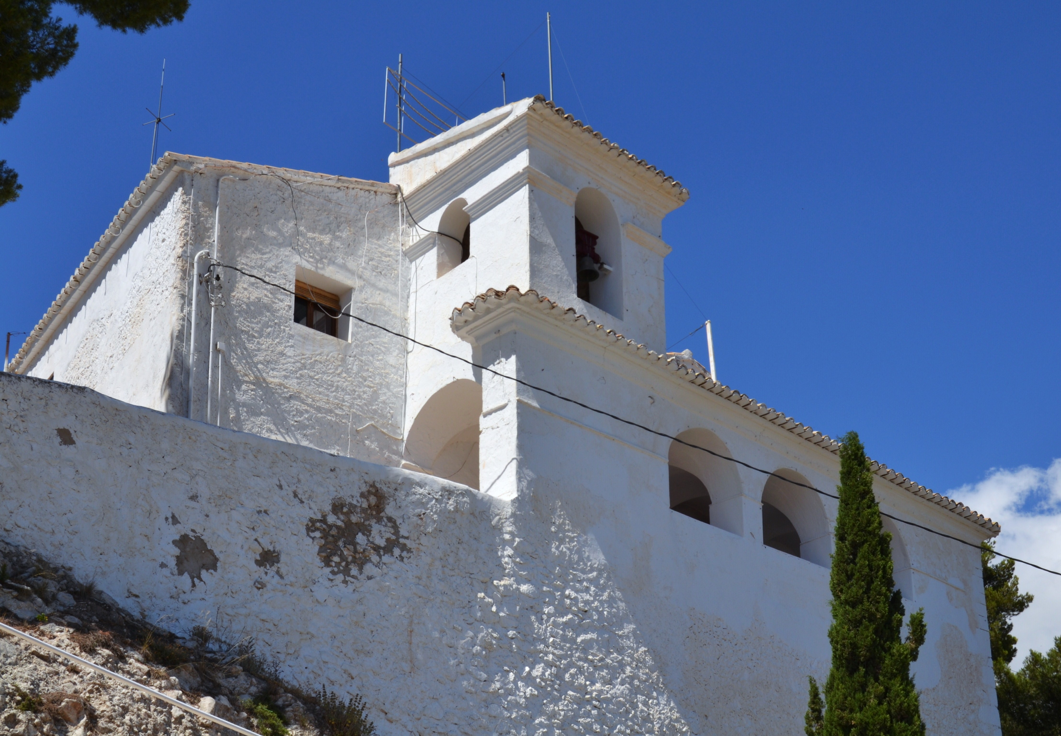 Ermita de santa Llúcia d'Ibi.